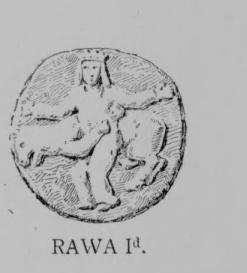 Rawicz Id